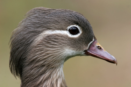 Mandarinente (weiblich).